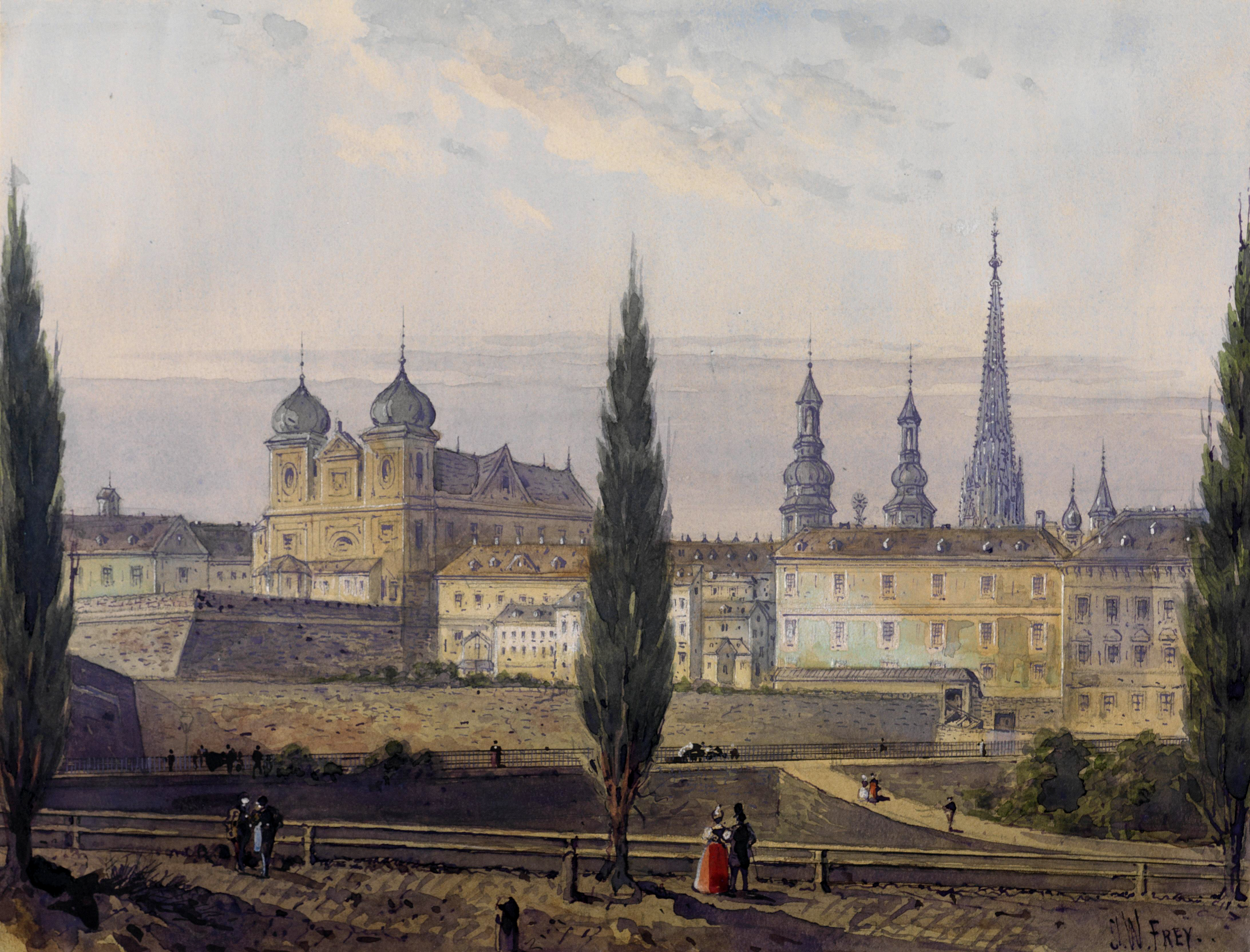 Stadtansicht aus Wien